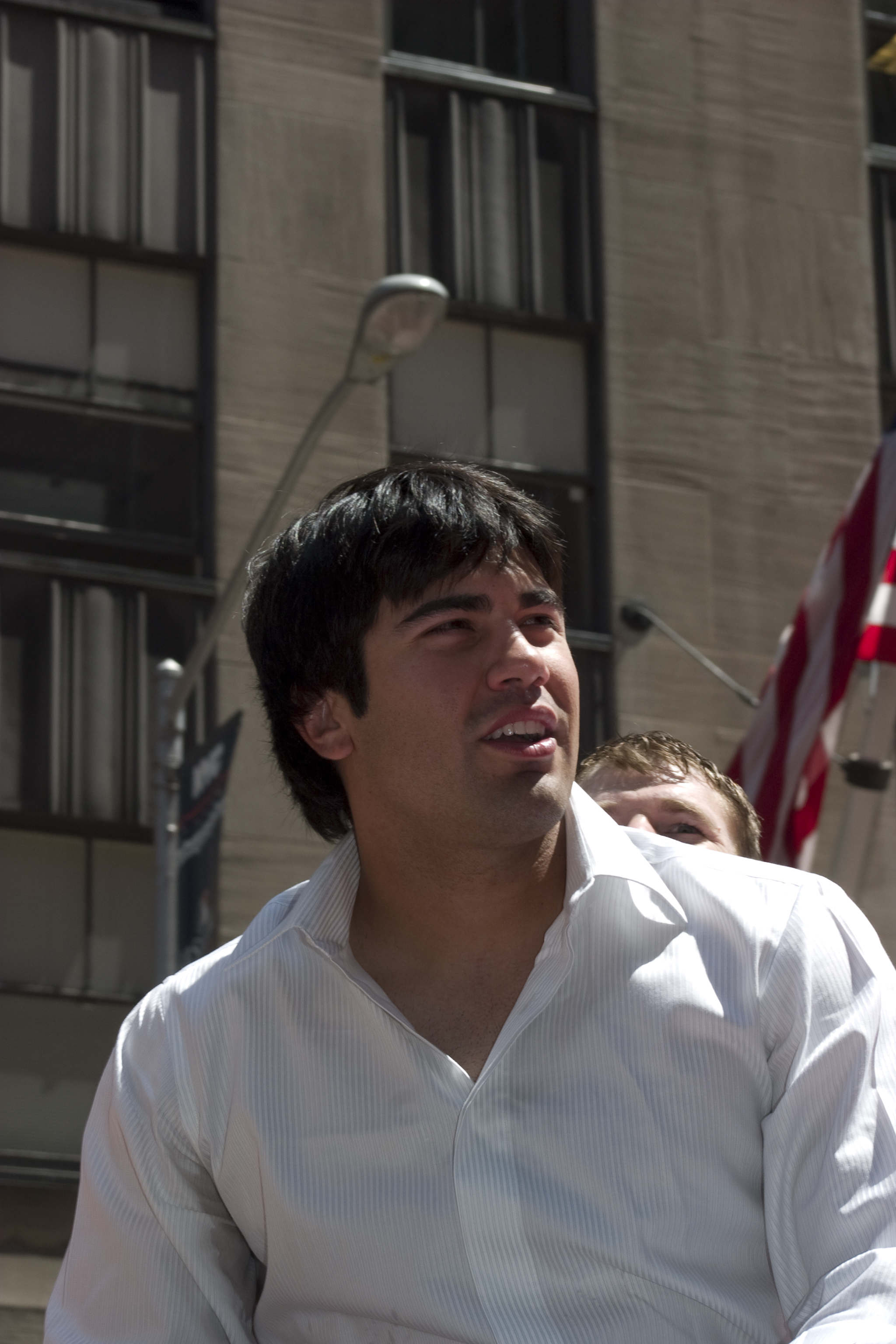 © Rubenstein, photographer Martyna Borkowski